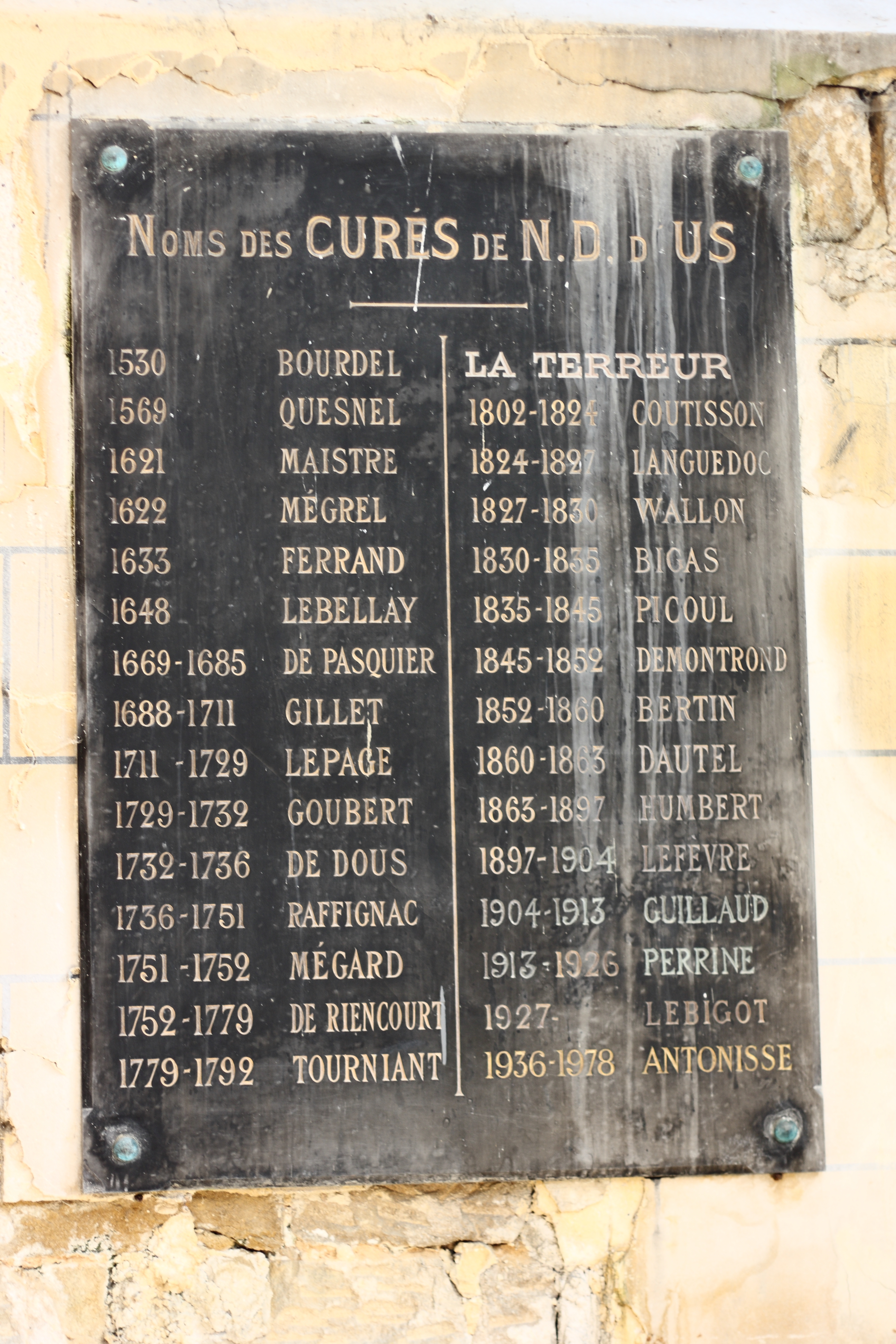 katholische Kirche Notre-Dame in Us